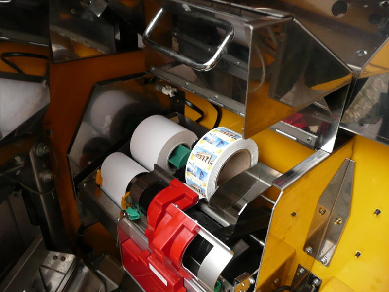 Briefmarkenautomat